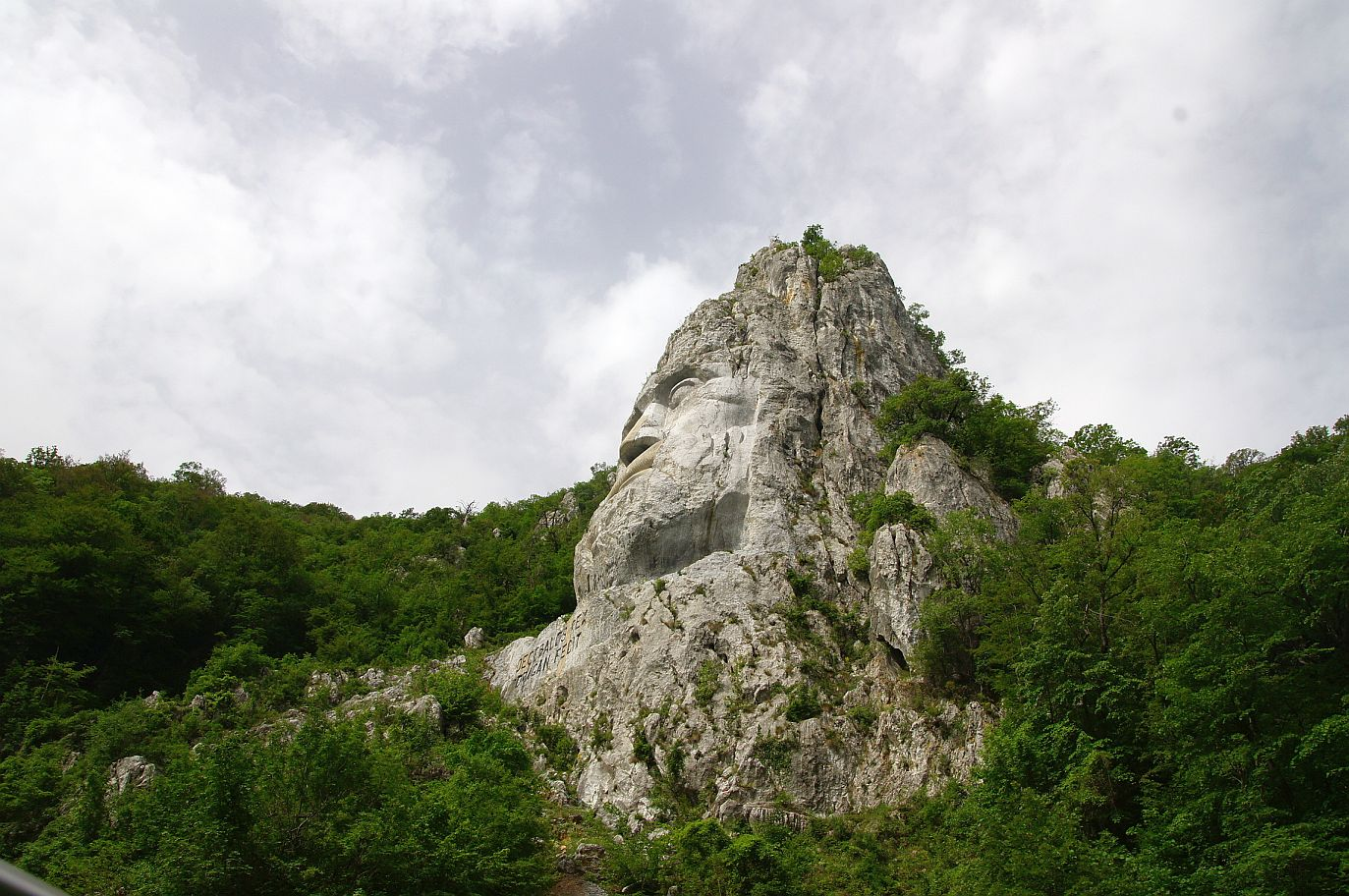 Decebal